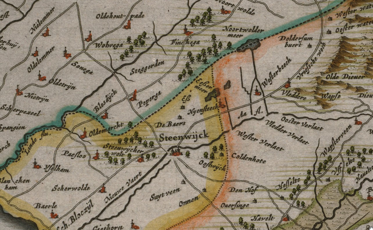 Oude kaart van Drenthe uit 1634 (fragment)